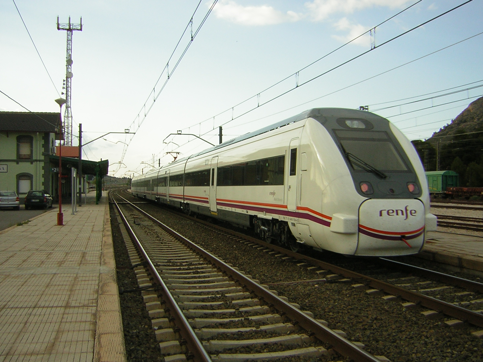 Unidad de tren eléctrica serie 449 a su paso por La Encina.